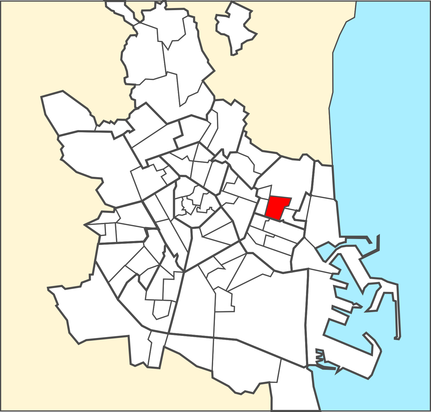 Localització del barri dins de la ciutat de València.